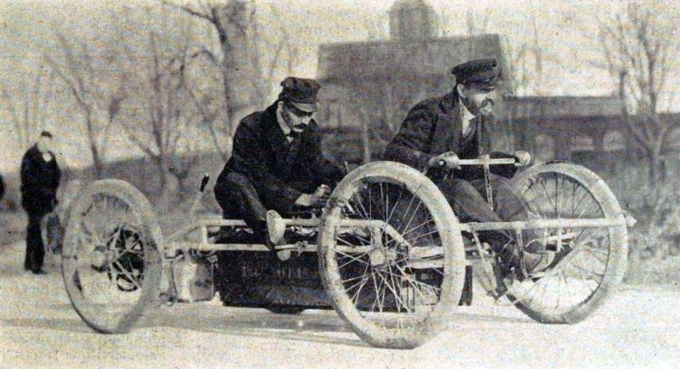 La Vie au Grand Air du 5 janvier 1902, p.11